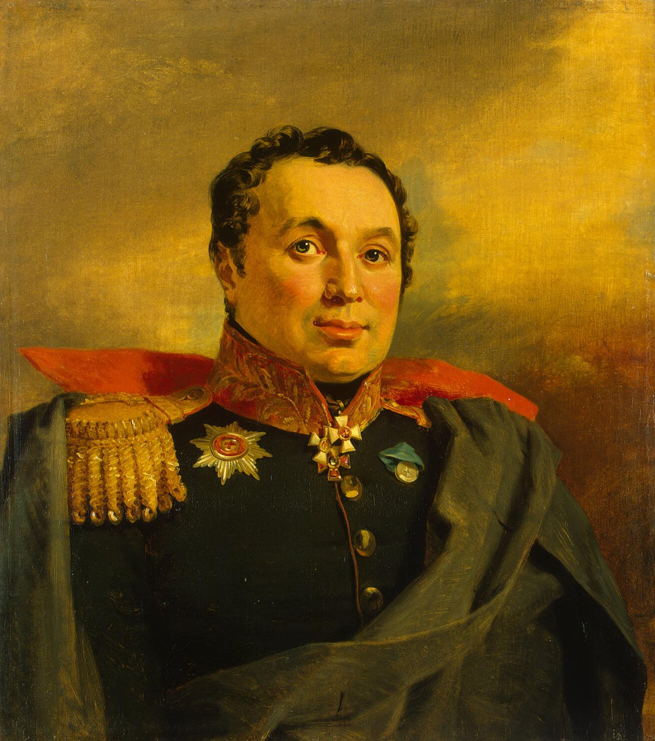 Afanasy Ivanovich Krasovsky (1780—1849) russian general